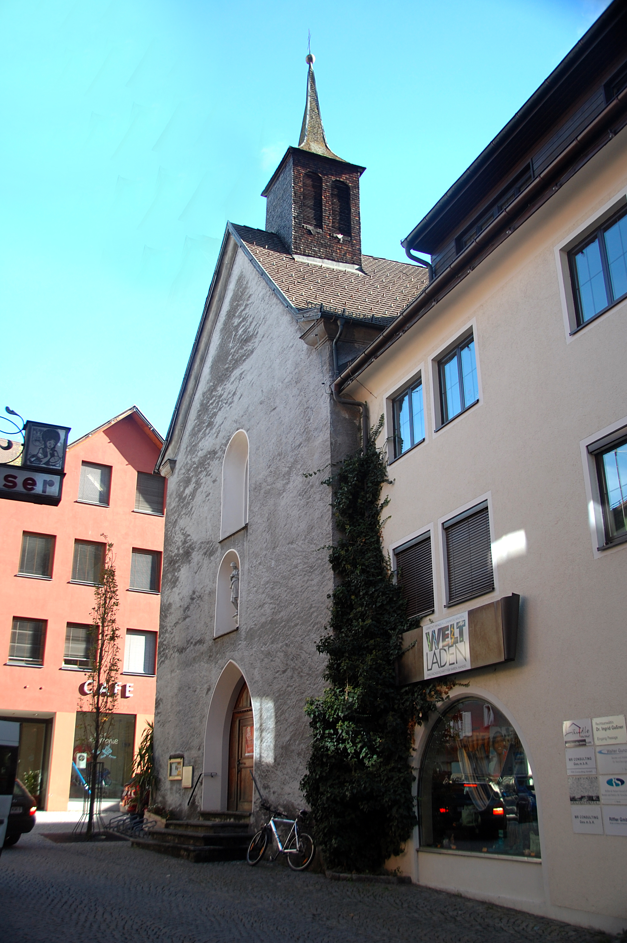 Spitalkirche zum Hl. Geist. Auch Heilig Geist Kirche.